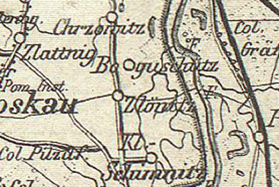 Kartenausschnitt mit Boguschütz. 1901.